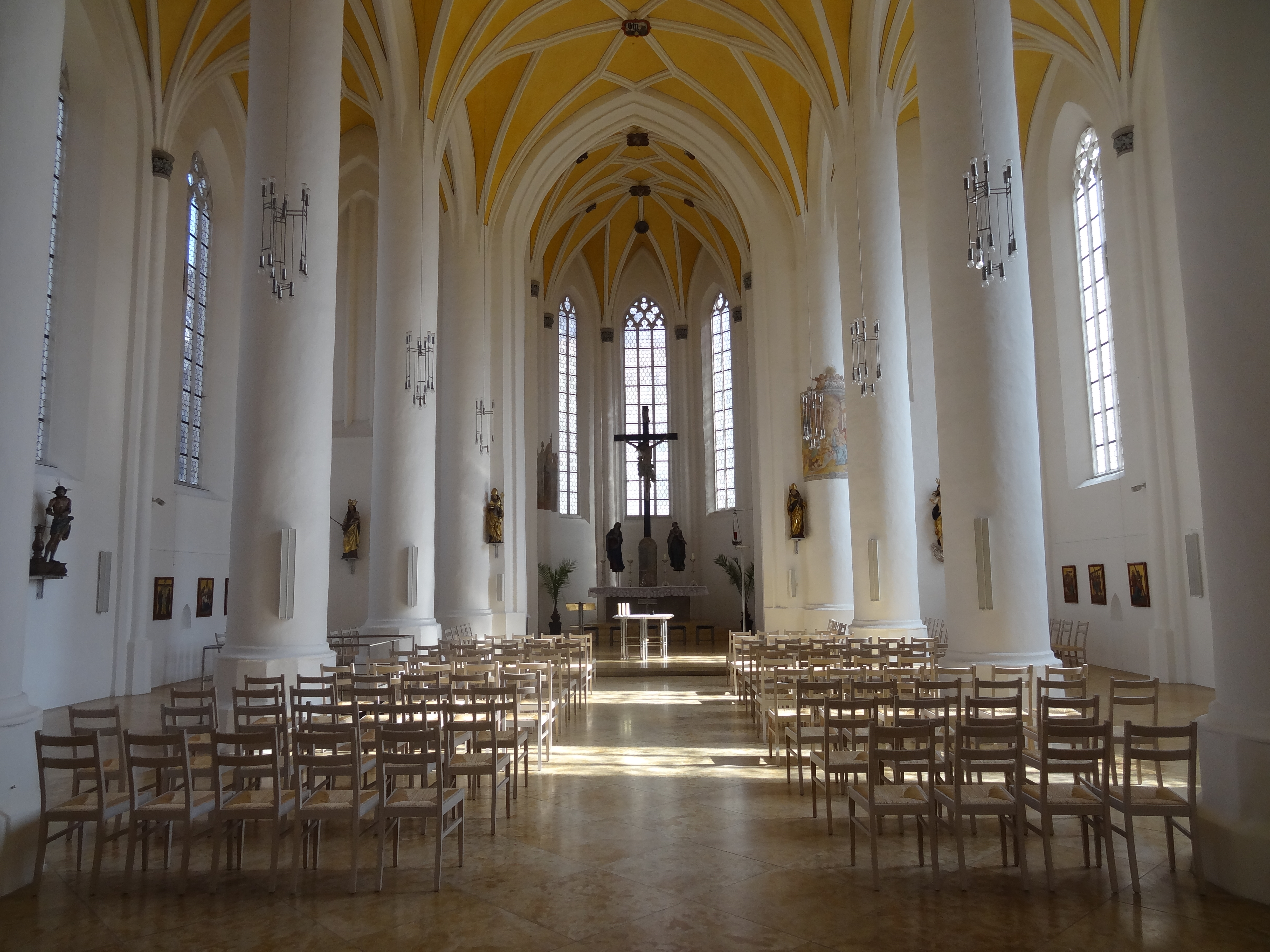 Innenraum der Kirche Alt-St. Nikola in Landshut